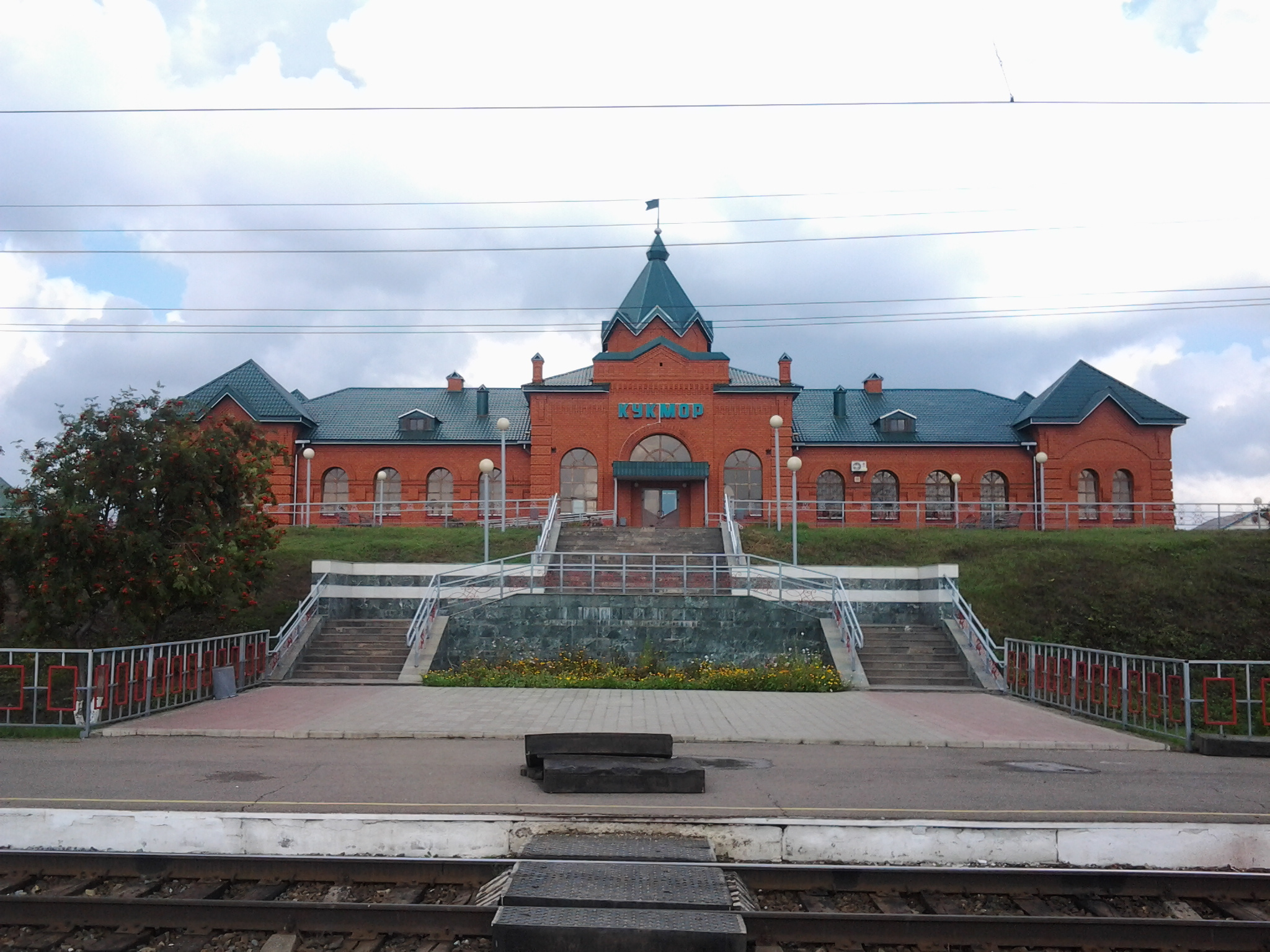 Железнодорожный вокзал Кукмора Татарча/tatarça: Кукмара тимер юл вокзалы